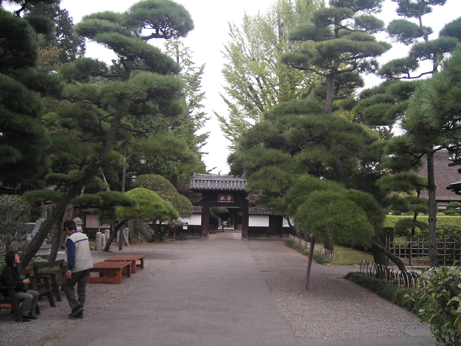 Ashikaga Gakkou in Ashikaga city,Tochigi,Japan 足利学校 学校門